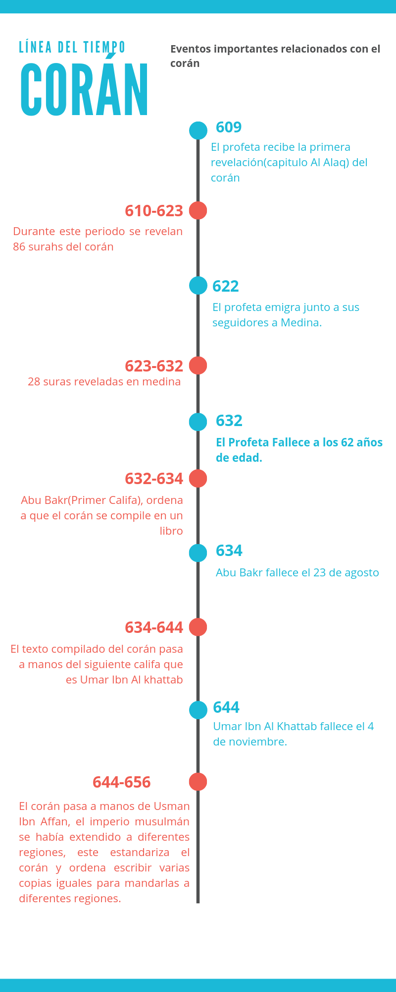 Este archivo representa una línea de tiempo con los eventos que ocurrieron durante la compilación del libro sagrado de los musulmanes.